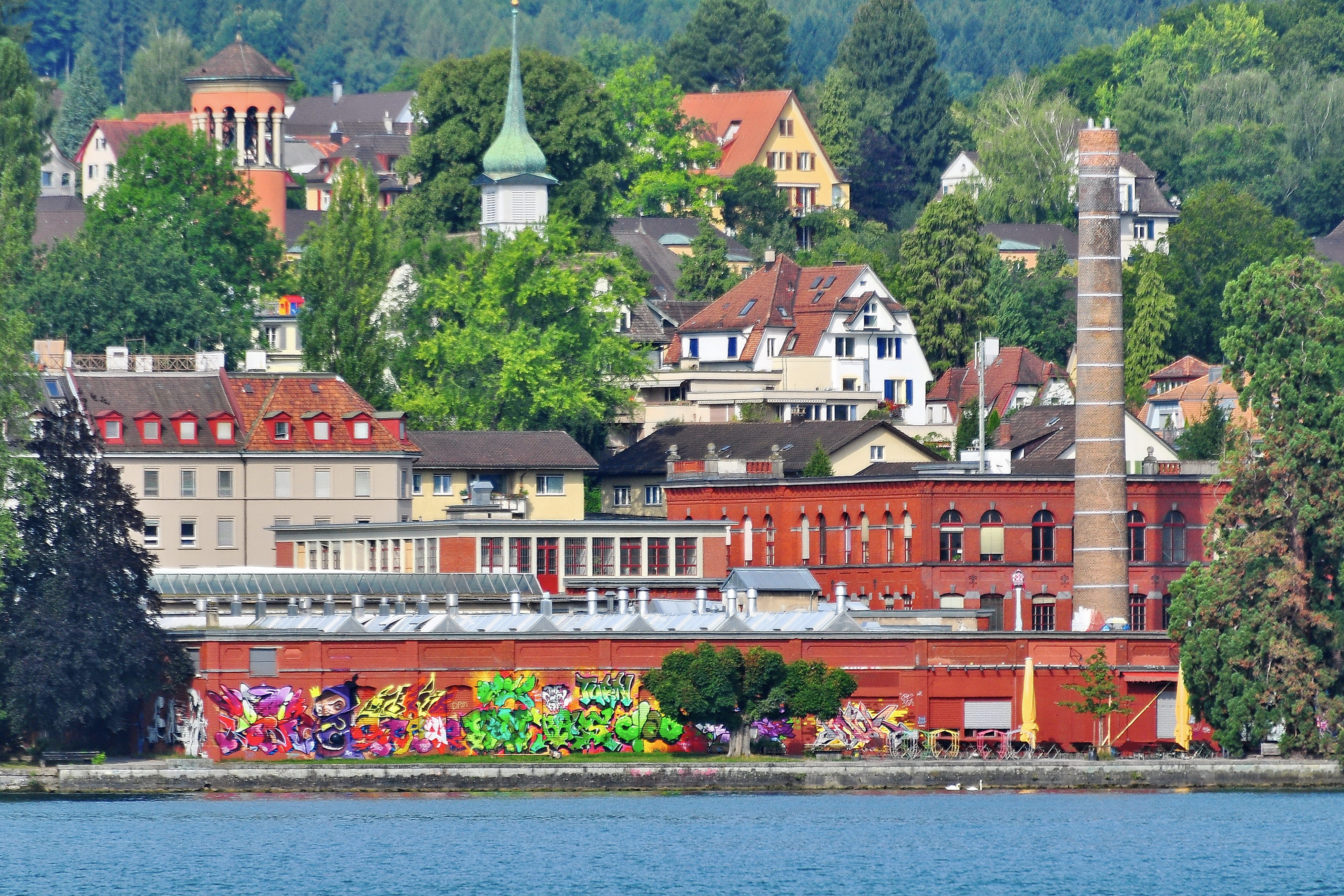 Fallätsche and Rote Fabrik in Zürich-Wollishofen as seen from Zürichsee-Schiffahrtsgesellschaft (ZSG) MS Wädenswil on Zürichsee in Switzerland